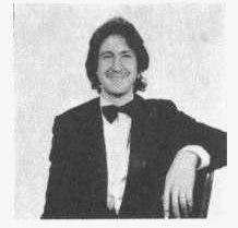 Gerardo Masana, músico y humorista argentino